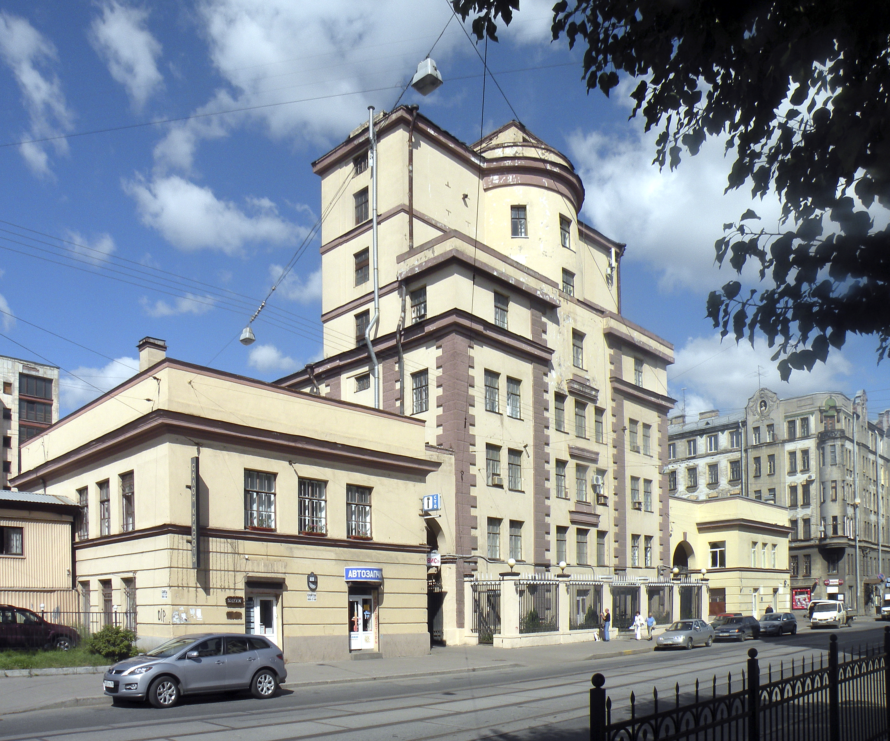 Бывшая церковь Преподобного Алексия, человека Божия, с Домом милосердия. Санкт-Петербург, Чкаловский просп., д. 50. Здание построено в 1906—1911 гг. по проекту гражданского инженера Г. Д. Гримма. Закрыта в 1932 и капитально перестроена в заводской цех.